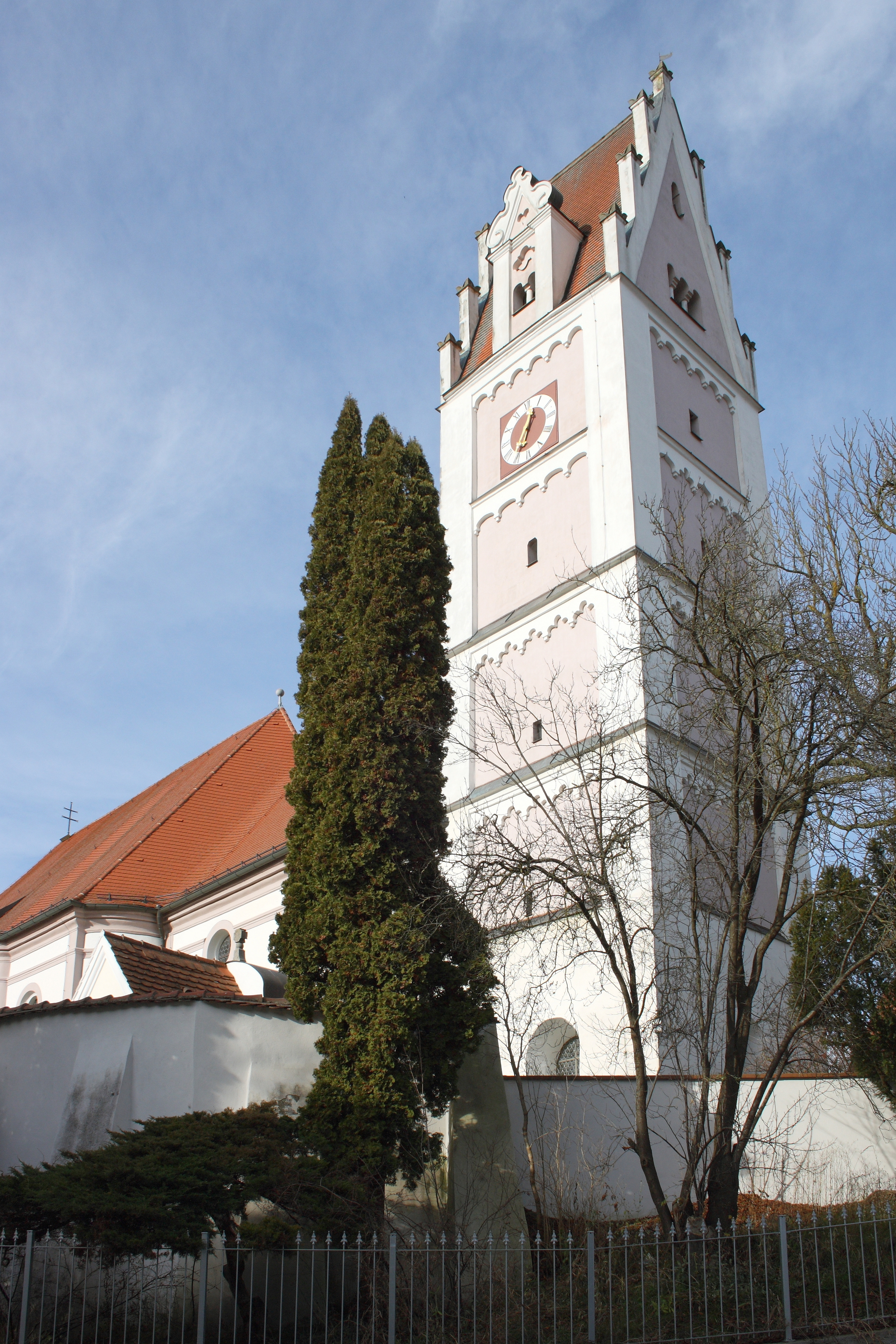 Katholische Pfarrkirche Mariä Himmelfahrt in Scheppach, einem Ortsteil von Jettingen-Scheppach im Landkreis Günzburg (Bayern), ehemalige Chorturmkirche, 1768 Neubau durch Joseph Dossenberger, ehemaliger Chorturm mit Satteldach, Fialen und Zwerchgiebeln